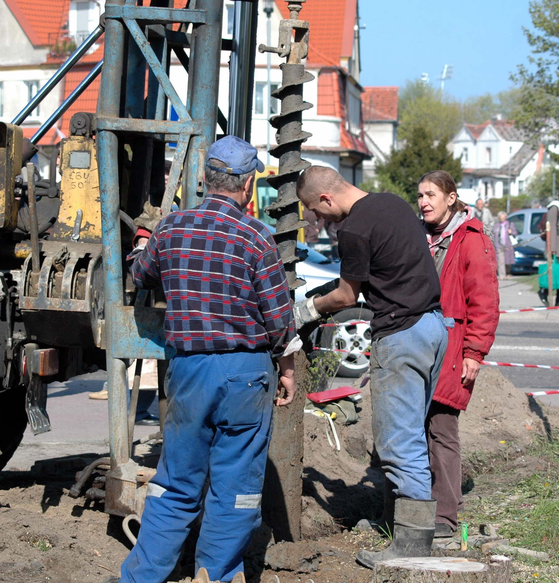 Wiercenia geologiczne w Kołobrzegu, przy Kanale Drzewnym przed budową nowego mostu. Prace prowadzi Przedsiębiorstwo Geologiczne GEOPROJEKT SZCZECIN.